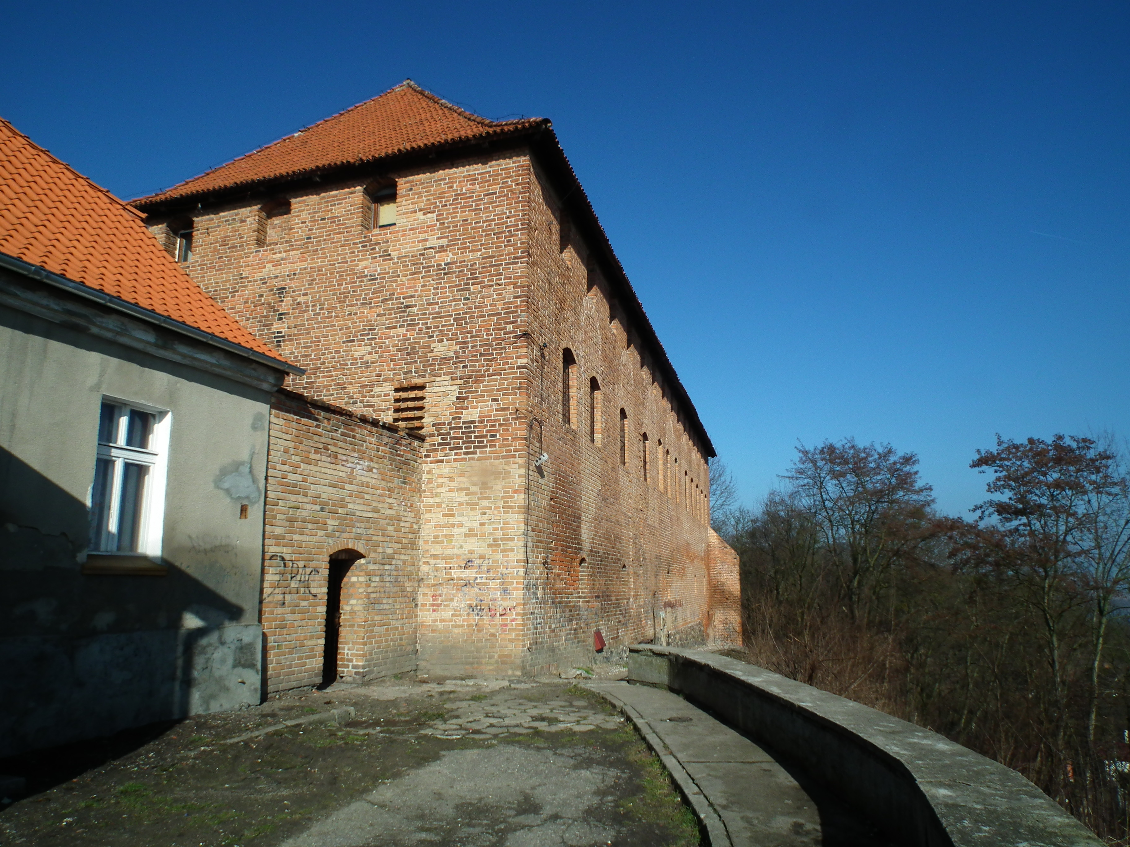 Widok miejski z miasta Nowe.